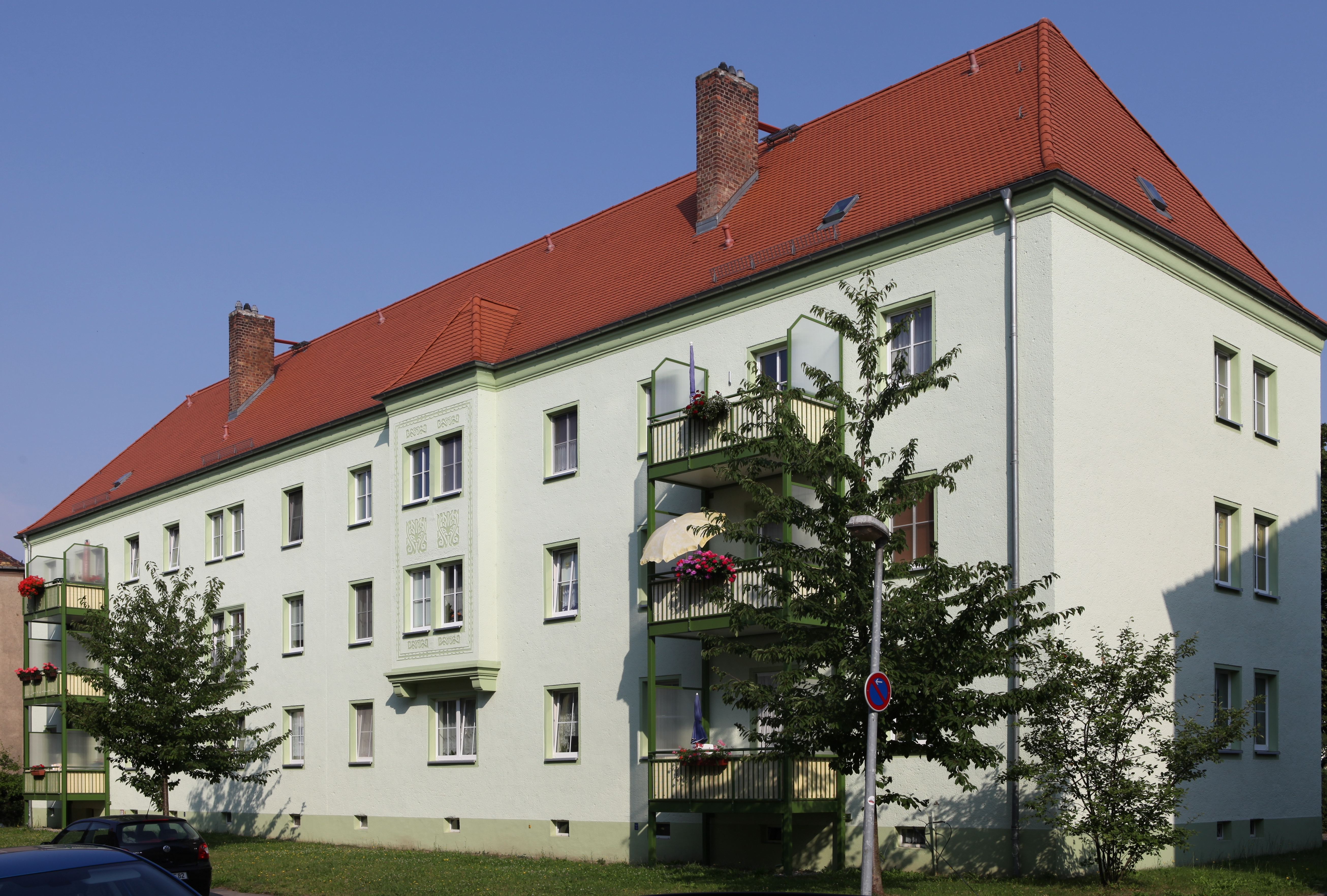 Kulturdenkmal Mietshaus Karlstraße 2/3 in Eilenburg; Objektnummer: 08973241